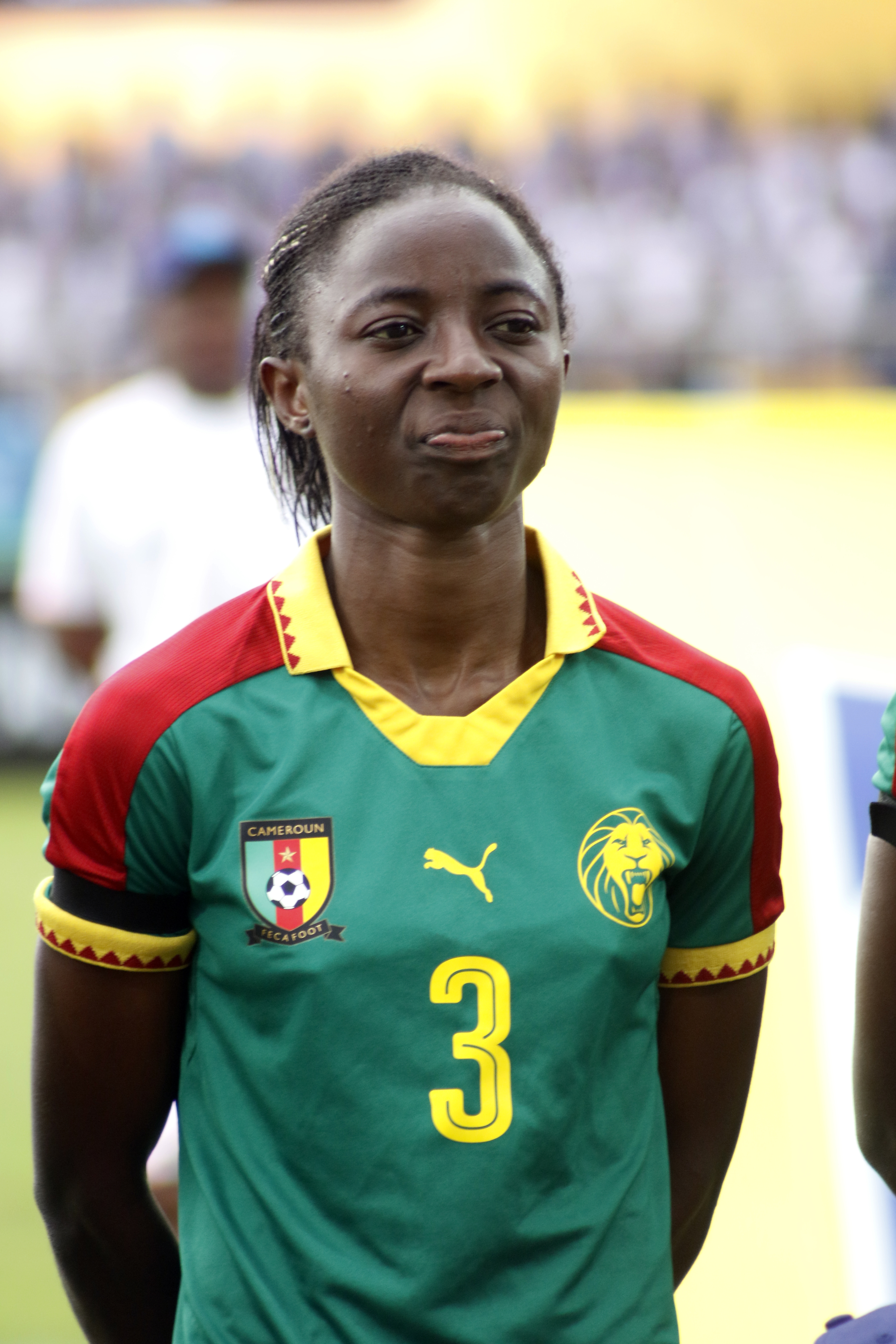 L'attaquante de l'équipe nationale du Cameroun qui évolue Wertern New York Flash, une équipe de première division aux Etats-Unis